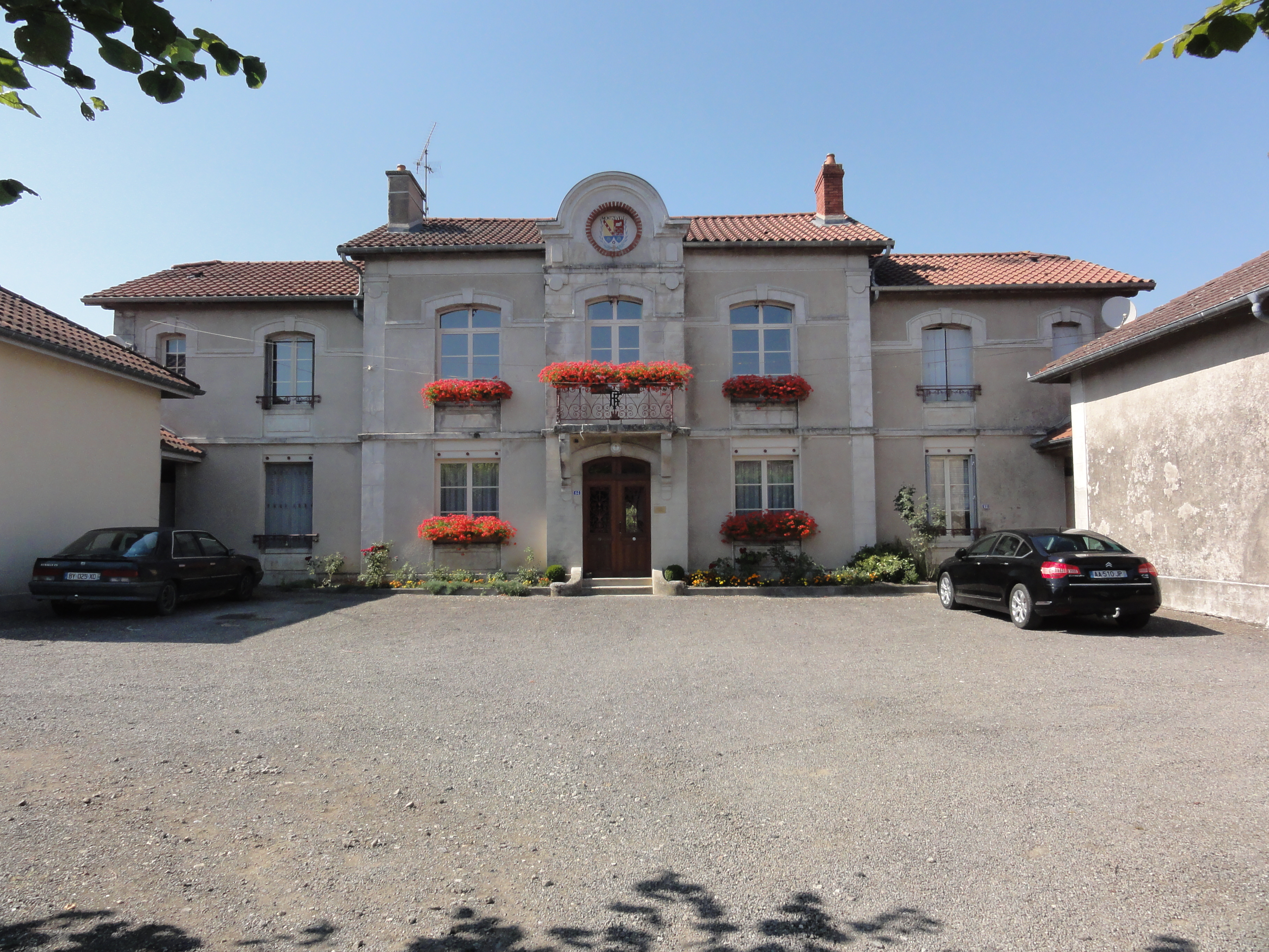 Montzéville (Meuse) mairie